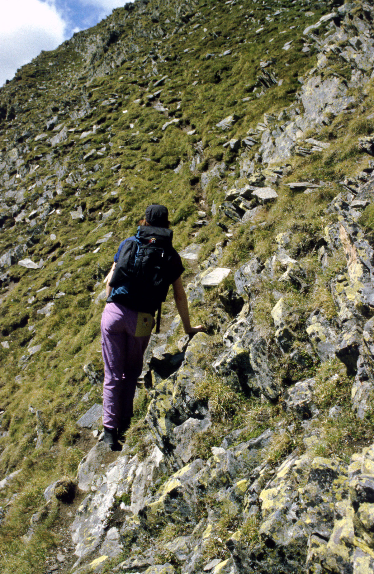 Im Schrofengelände beim Anstieg zum Sturpen. Aufgenommen am 10.08.2000.